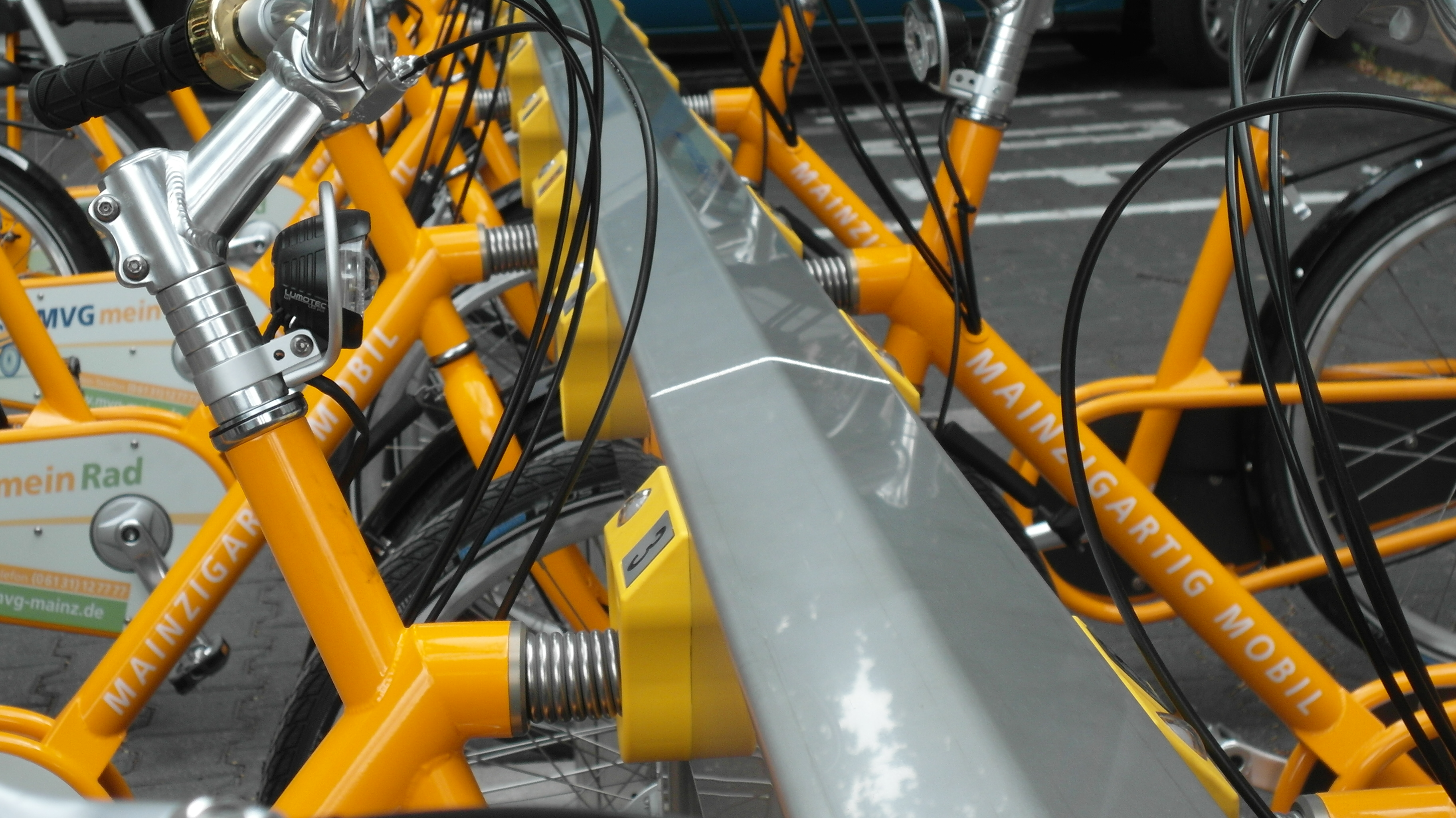 Detailaufnahme einer MVGmeinRad-Station, Mainz.